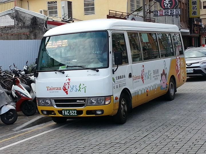 中文（台灣）: 葛瑪蘭客運Fuso Rosa中型巴士FAC-322，台灣好行塗裝。